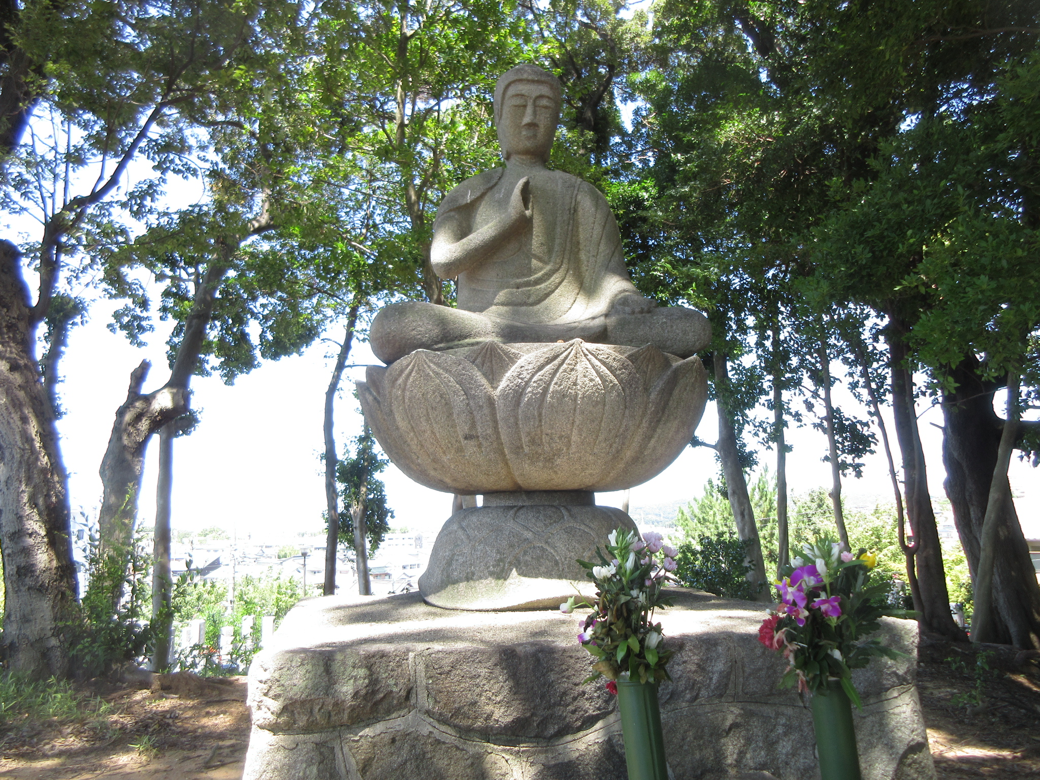 西光寺の阿弥陀如来石像（岡崎市鴨田町）